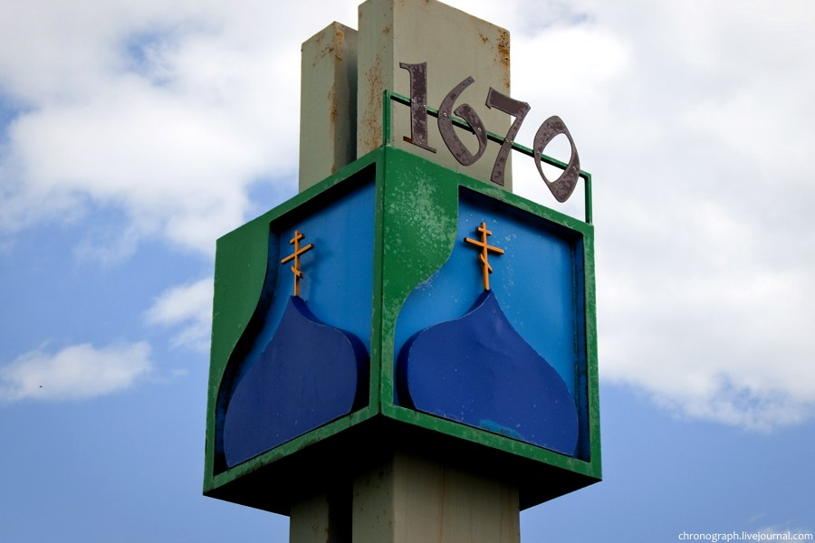 Стела с предполагаемым годом основания села Большая Рязань. Ставропольский район Самарской области